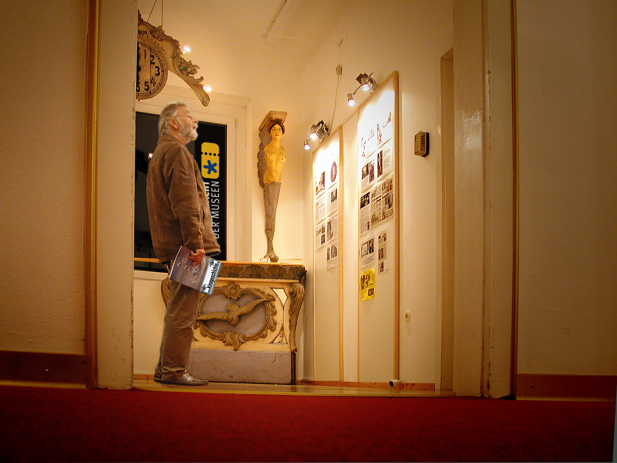 Historische Kinoausstellung im ehemaligen ORF-Sender-See am Lendkanal in Klagenfurt u.a sind Teile des letzten Kärntner Wanderkinos zu sehen.